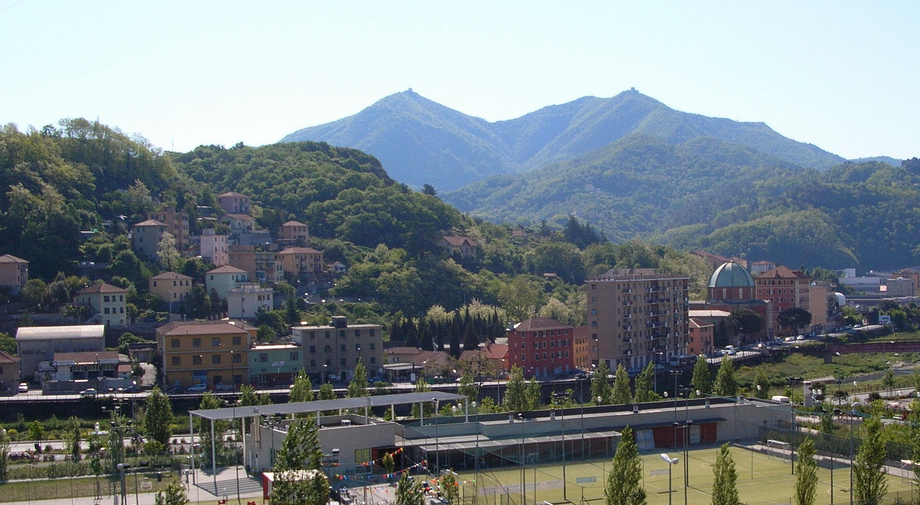 Genova-Bolzaneto, veduta della località Serro